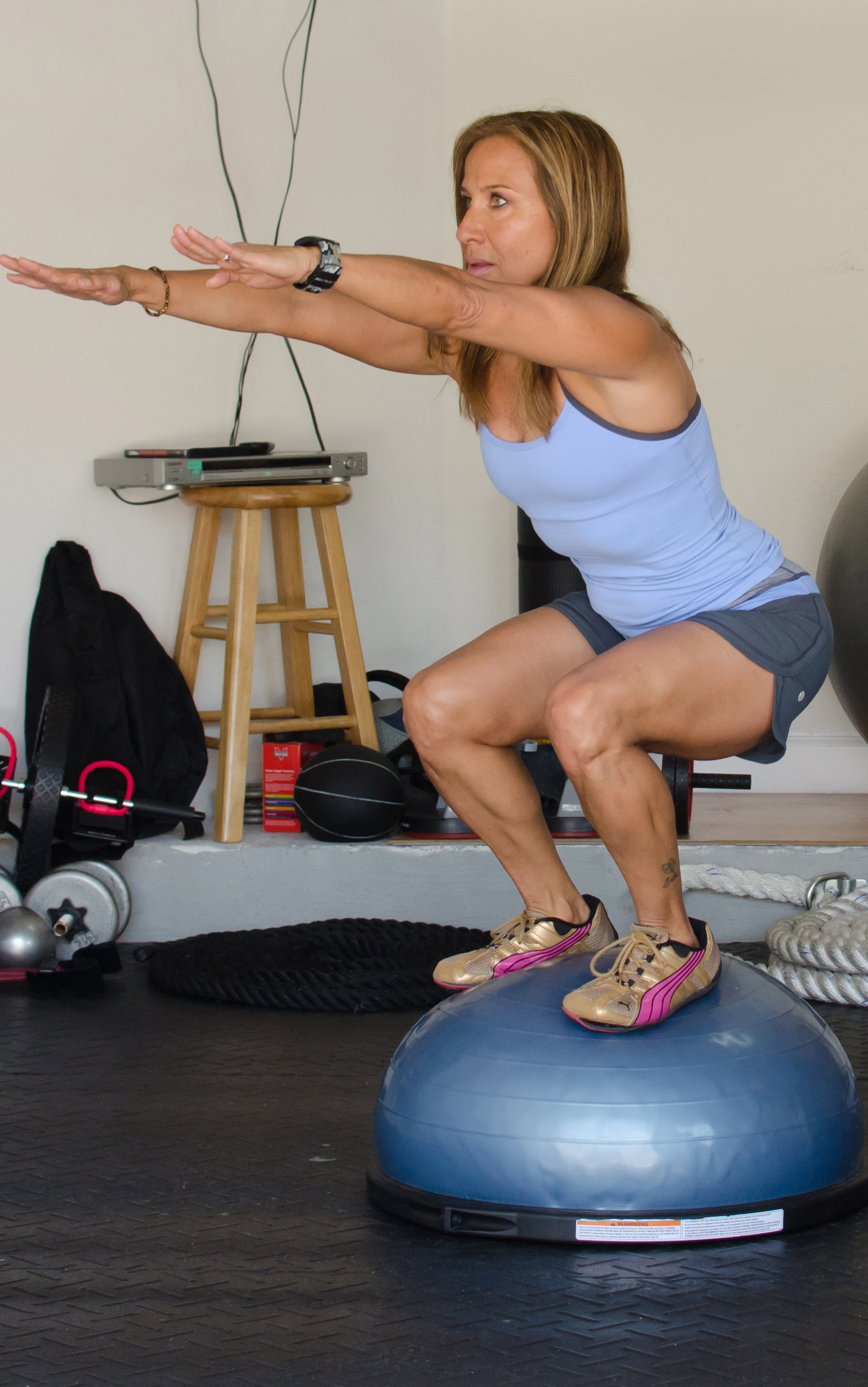 Entrenamiento con bosu